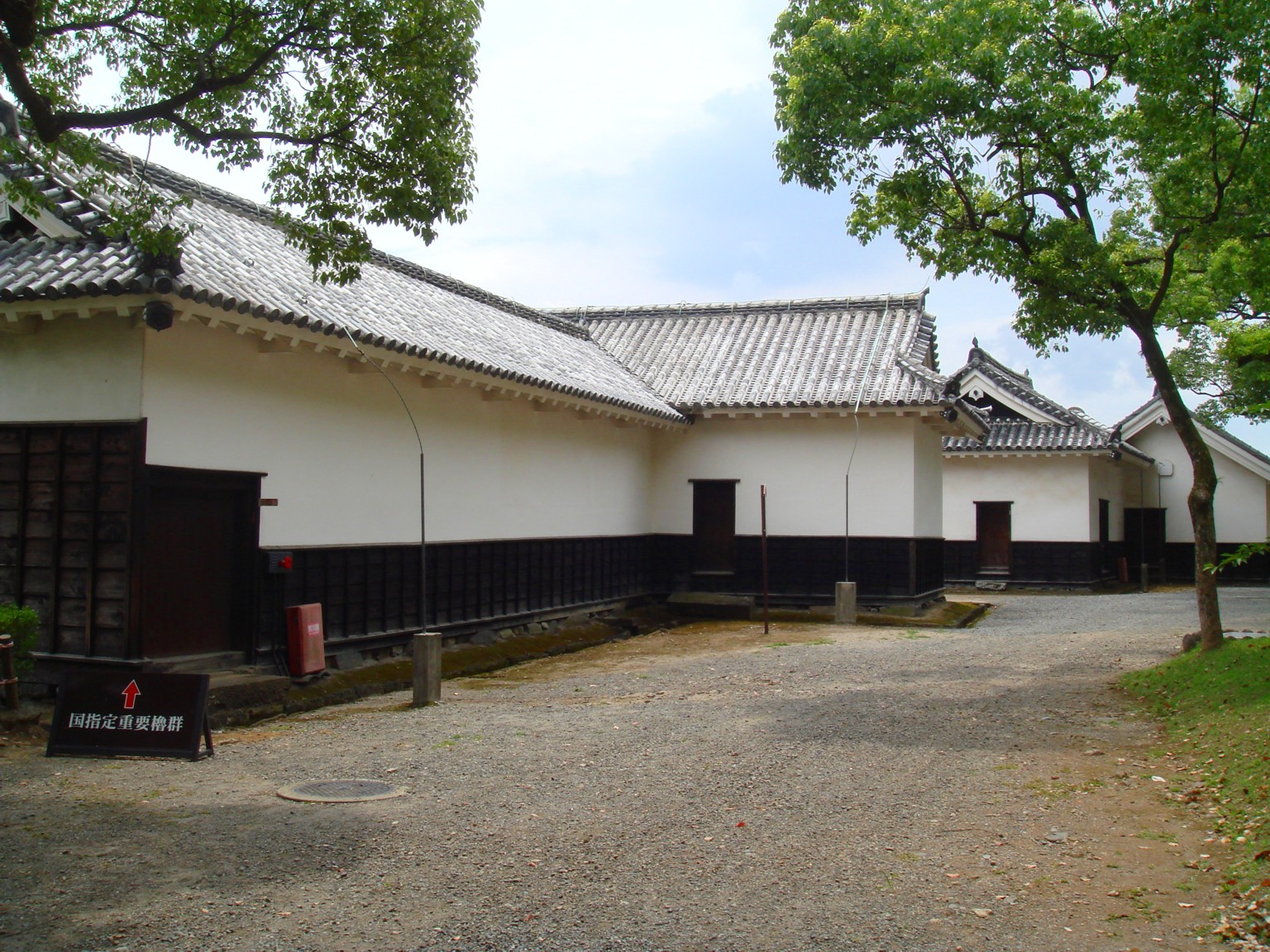 熊本城東竹之丸に現存する櫓群。手前が「源之進櫓」次いで「四間櫓」、奥の切妻屋根の建物が「十四間櫓」である。日本の文化財保護法に基づく国の重要文化財に指定されている。